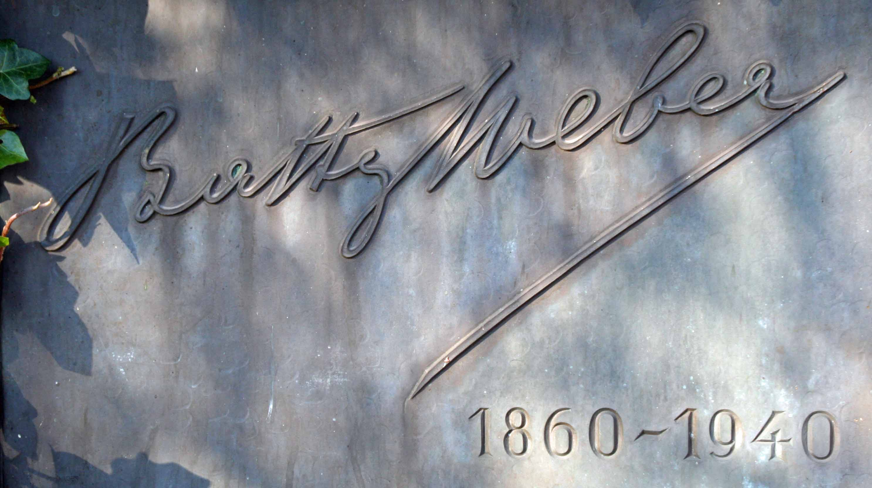 Batty Weber Grafplack.